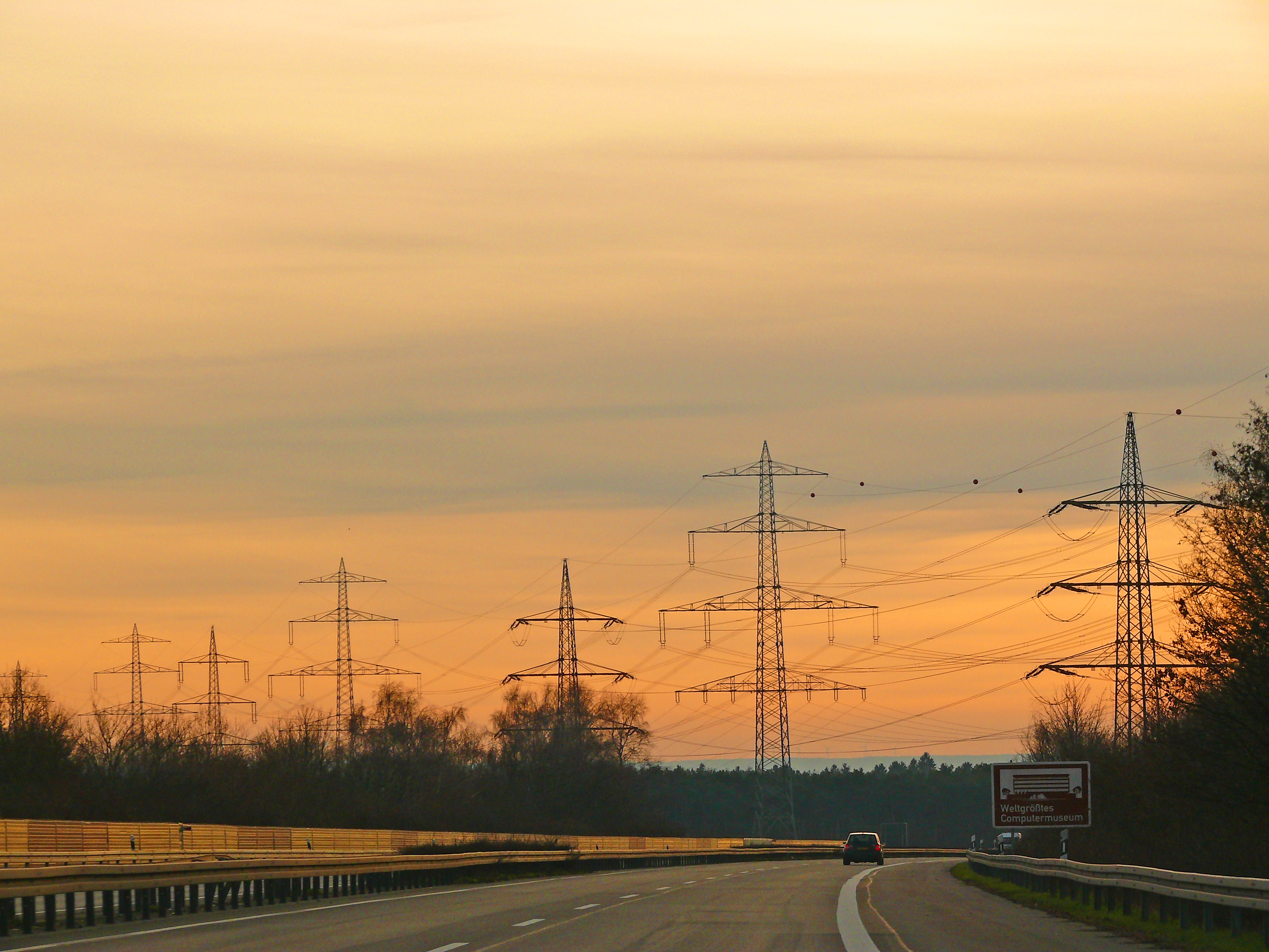 Deitsch: Hochspannungsleitungen überqueren die A33 in Paderborn zwischen den Anschlussstellen 24 PB-Sennelager und 25 PB-Schloß Neuhaus, von Norden kommend Blick nach Süden